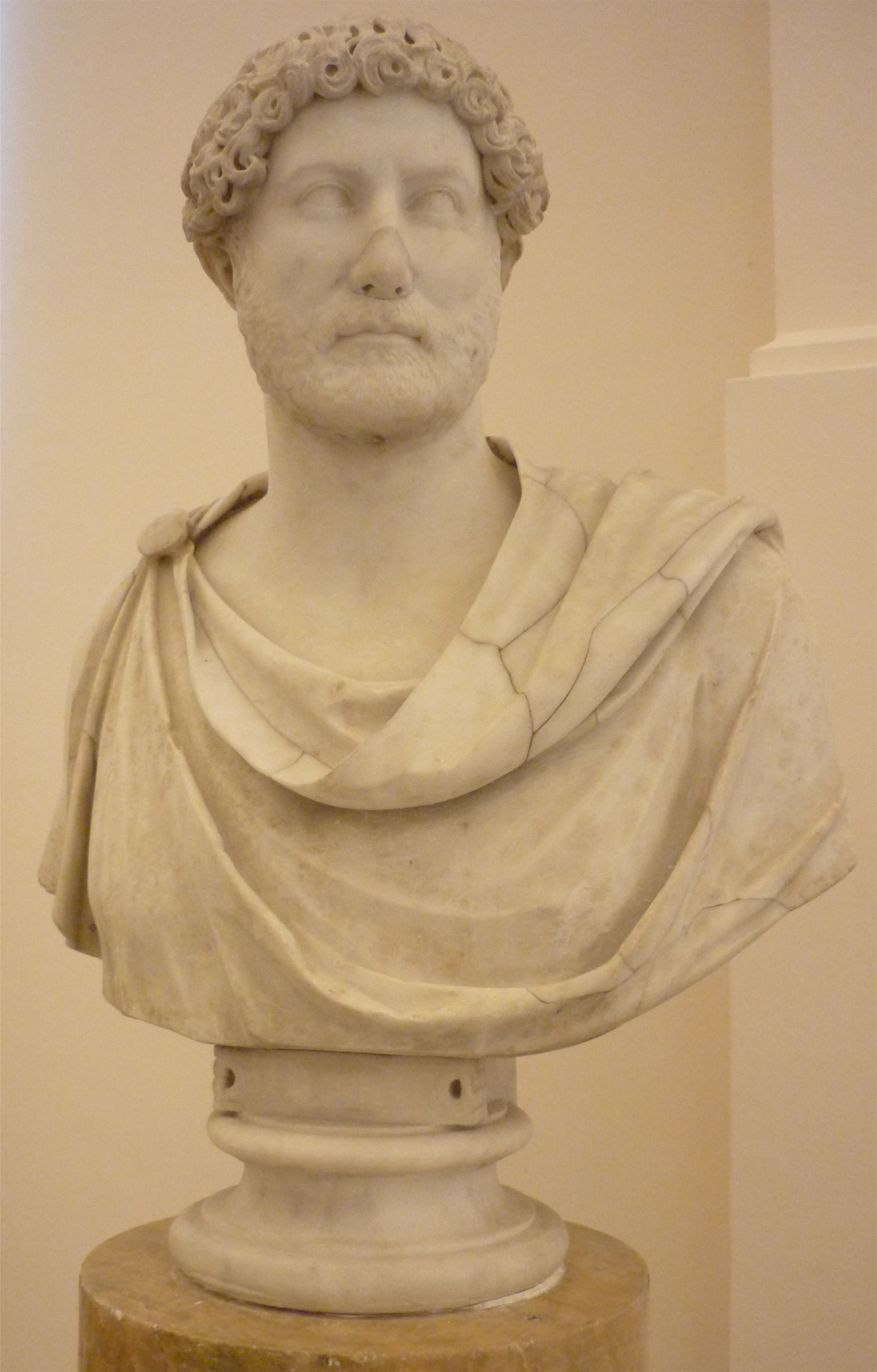 Buste de Marc-Aurèle Hadrien - Musée archéologique de Naples, Collection Farnese, (inv. nr. 6069) - Italie